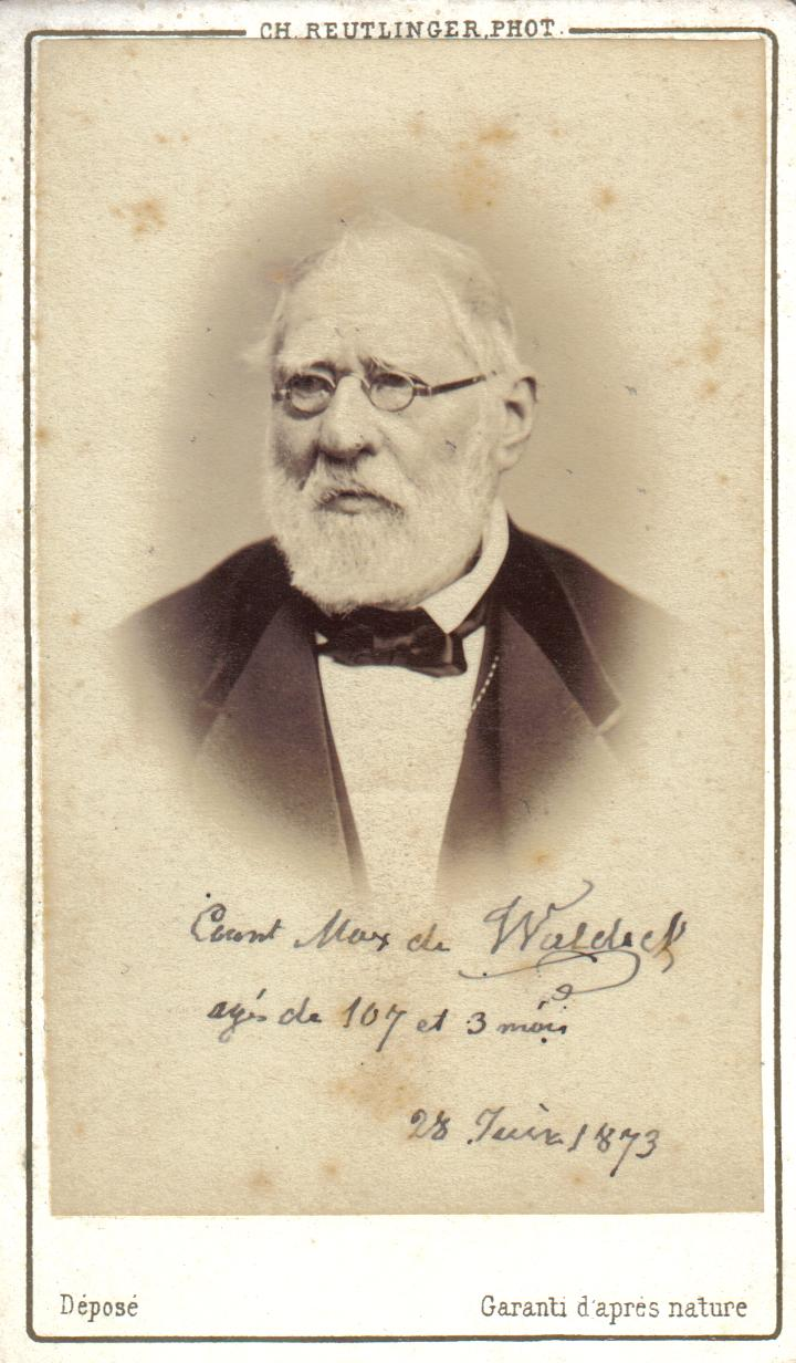 J. F. De Waldeck